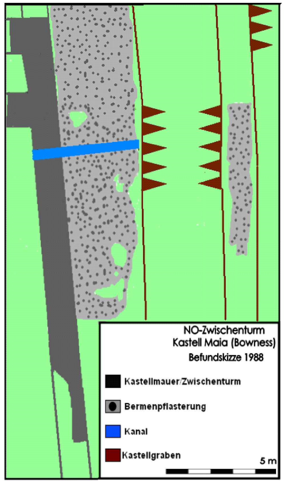 Befundplan 1988 Zwischenturm NO, Kastell Bowness (Maia), Hadrianswall.